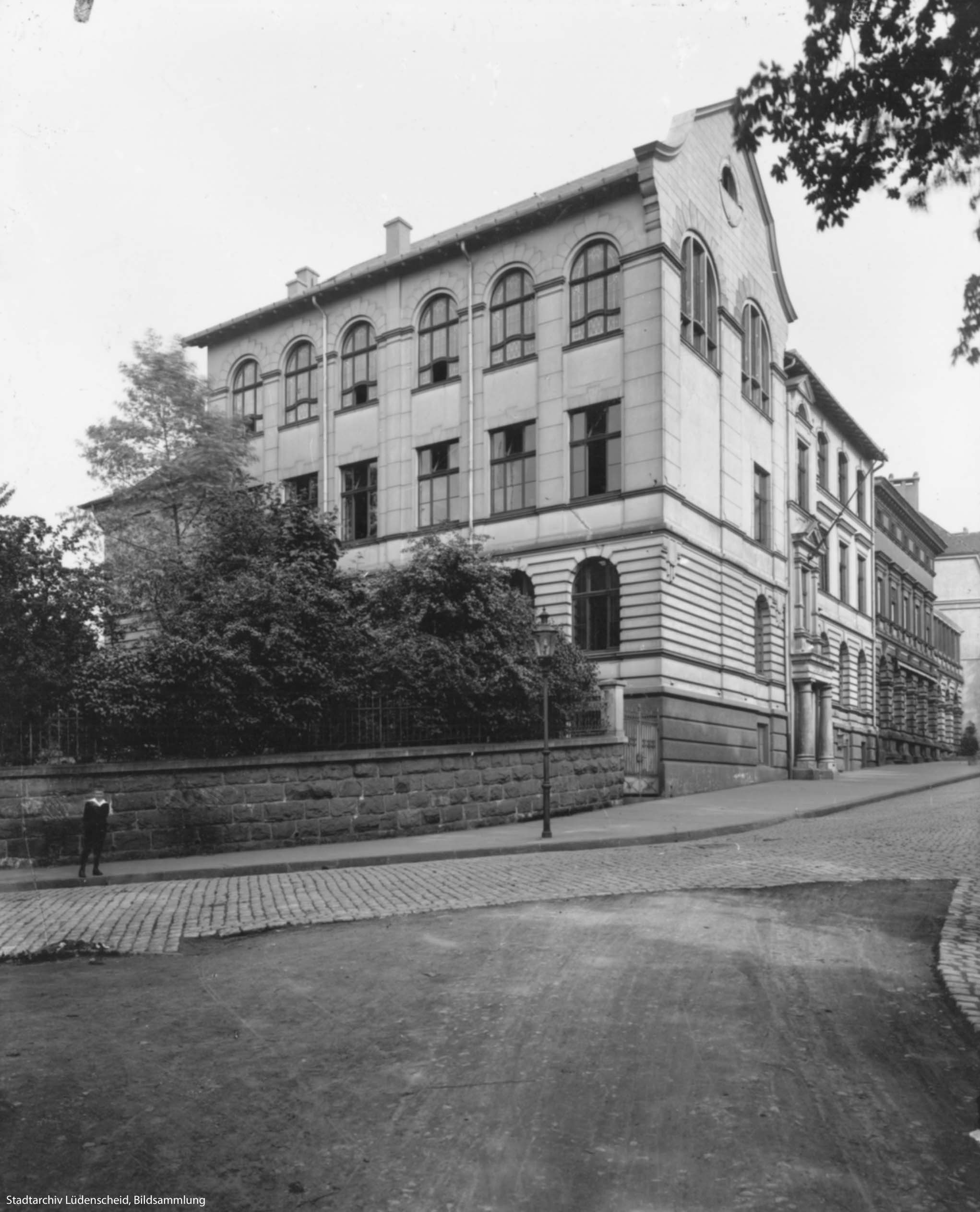 Das ehemalige Lyzeum Lüdenscheid an der Sauerfelderstraße 5